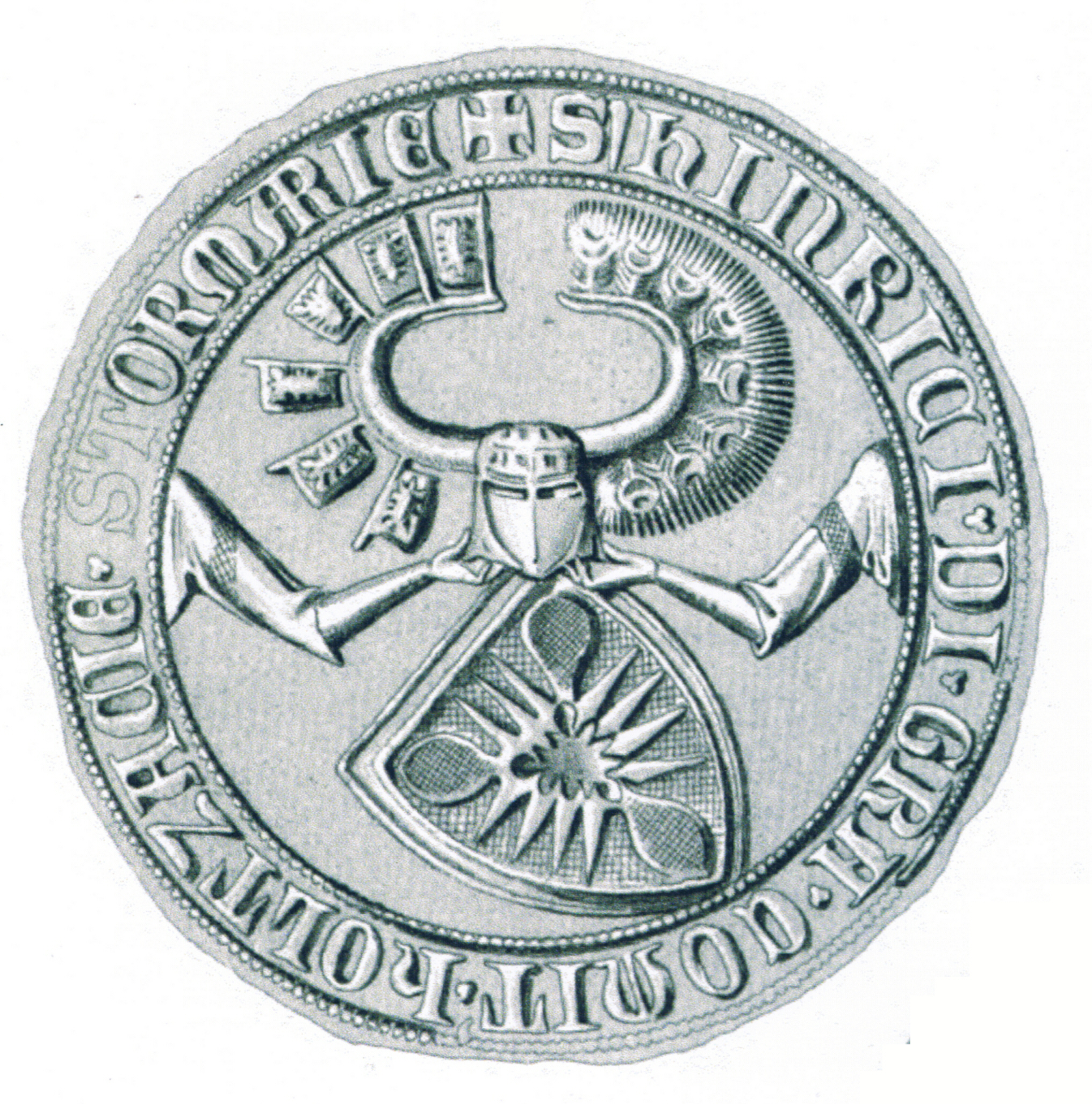 Siegel des Heinrich II. (* um 1317; † 1382, genannt Heinrich der Eiserne), Graf von Holstein-Rendsburg und Herzog von Schleswig. Das Siegel stammt aus der Zeit um 1343.